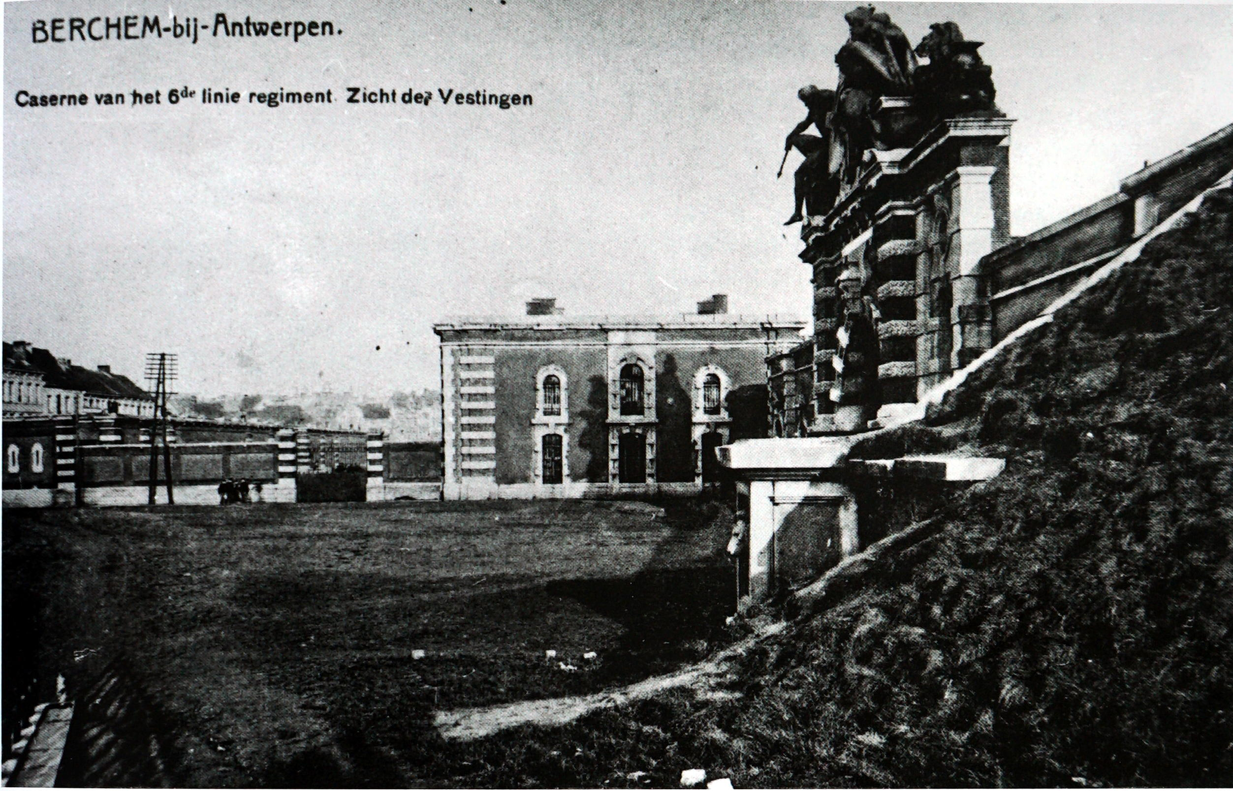 vue de la porte aujourd'hui disparue.